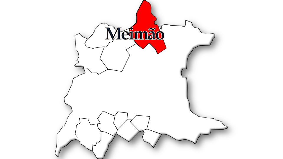 População